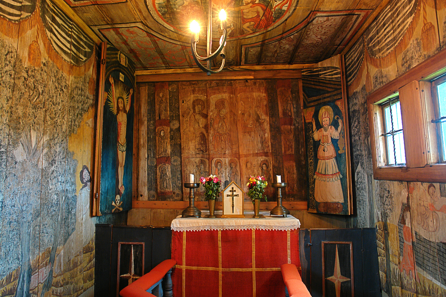 Stabkirche von Hedared: Das geöffnete Altarbild, dahinter das mittelalterliche an die Außenwand gemalte Bild. Es stammt vermutlich aus dem späten 14. Jh. und stellt die Krönung der Jungfrau Maria dar.